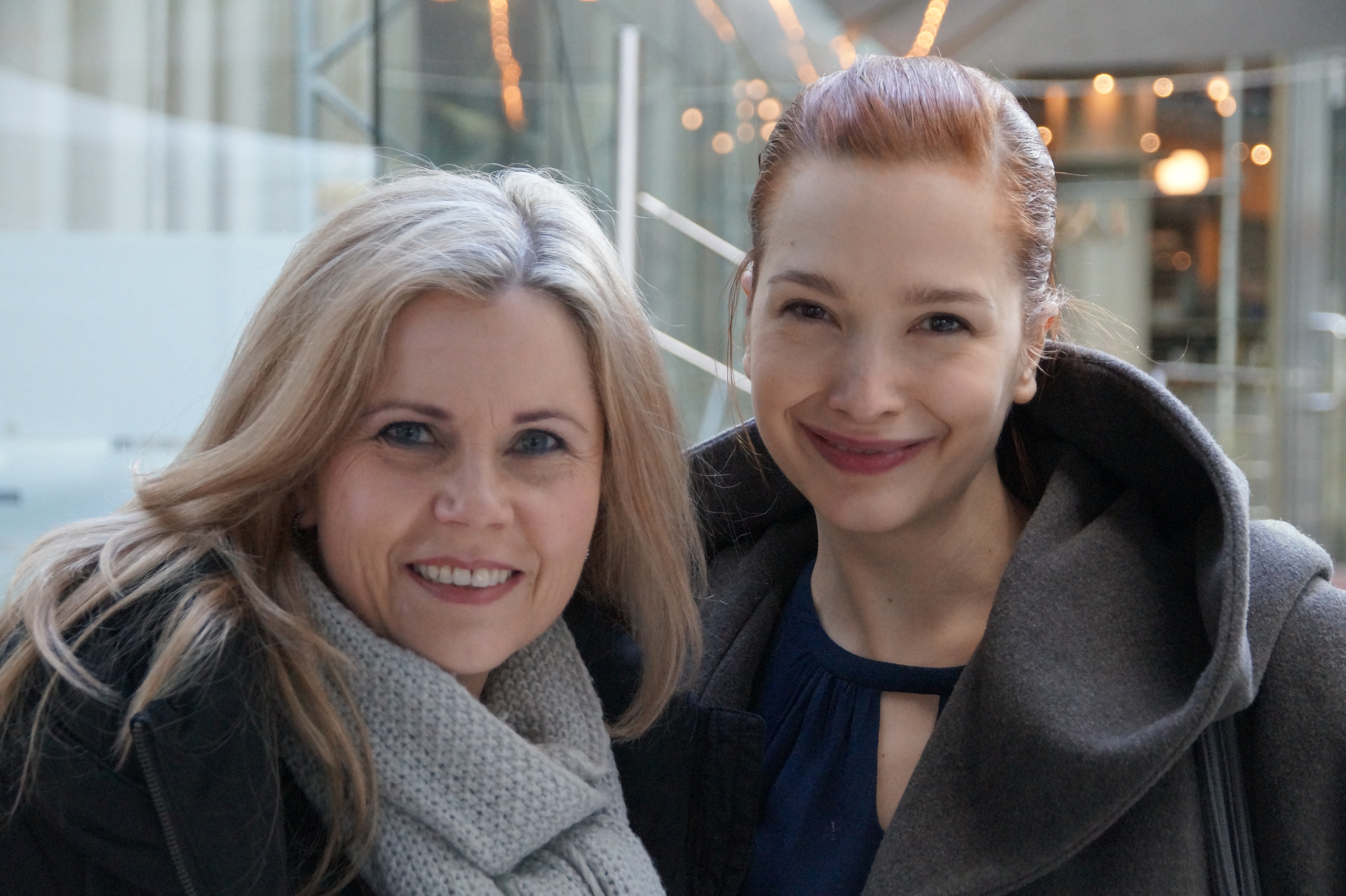 Michaela Schaffrath und Uta Kargel bei der Verleihung des Kurzfilmpreises "Blaue Blume", am 10.02.2016, im Sony Center Berlin.